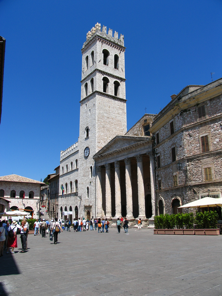 Assisi, Torre Civica e Tempio di Minerva.. Santa Maria sopra Minerva, Assisi, Umbria, Italia.Assisi, Torre Civica e Tempio di Minerva